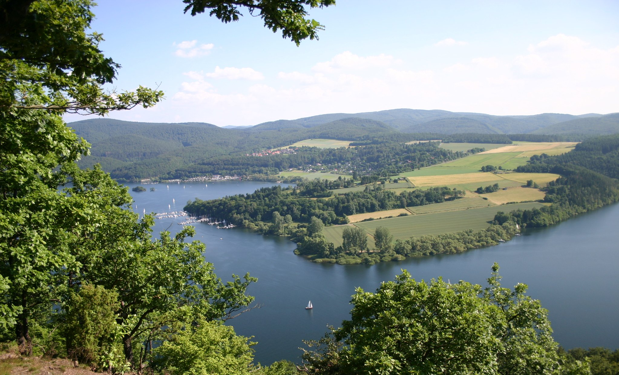 Blick auf den Edersee. Standort: Kahle Haardt südlich von Basdorf bei Vöhl - Schöne Aussicht in Richtung Bringhausen und Liebesinsel. Erstellt anlässlich des Basdorfer Stumpetreffs 2006 in der Basdorfer Grillhütte. mit Canon EOS 300D